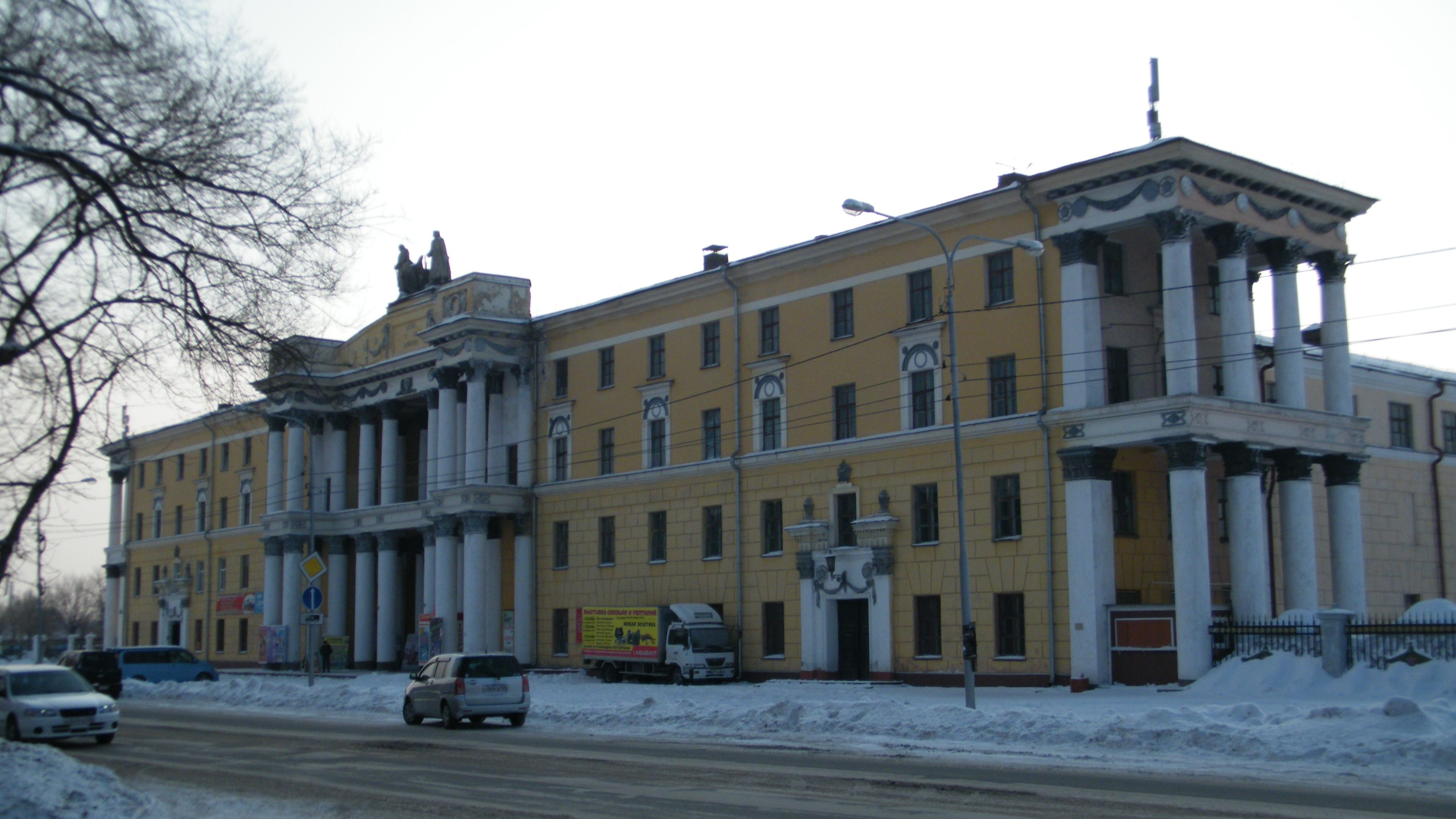 Драматический театр Восточного военного округа, г. Уссурийск.